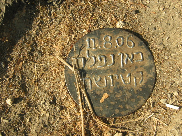 כאן נפלה קטיושה